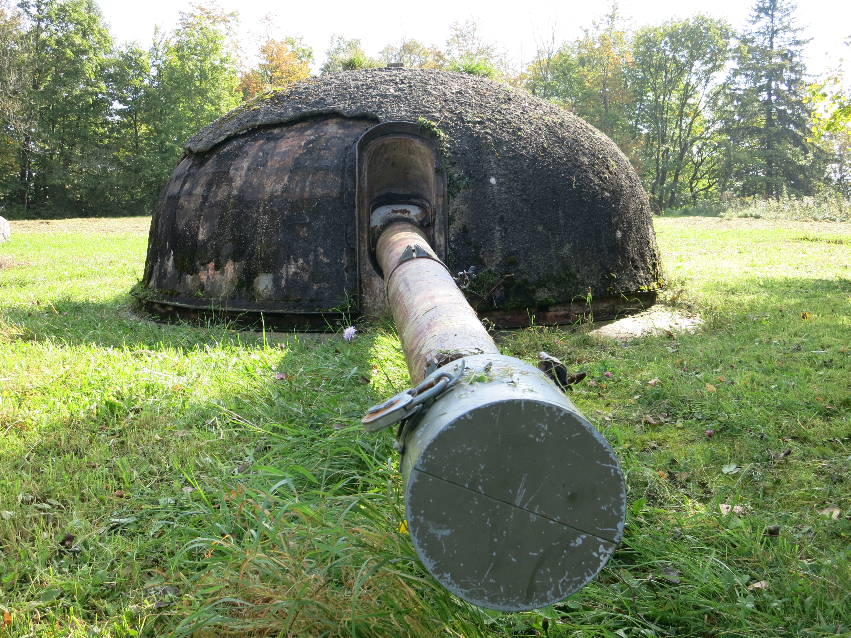 Festung Castels, Mels SG, Schweiz